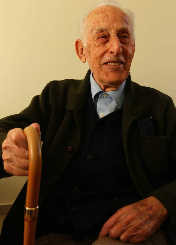 Es una foto de mi abuelo Eusebio González Mayorga